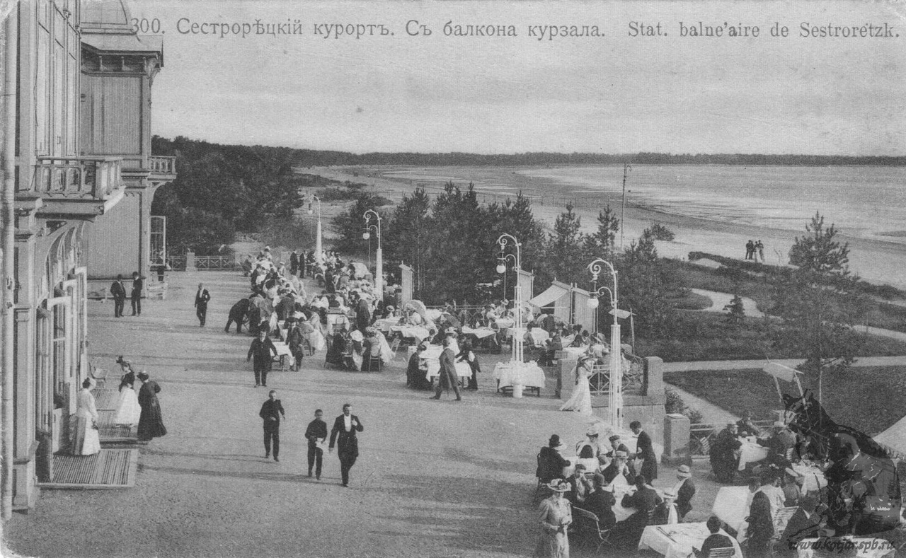 Сестрорецкий курзал